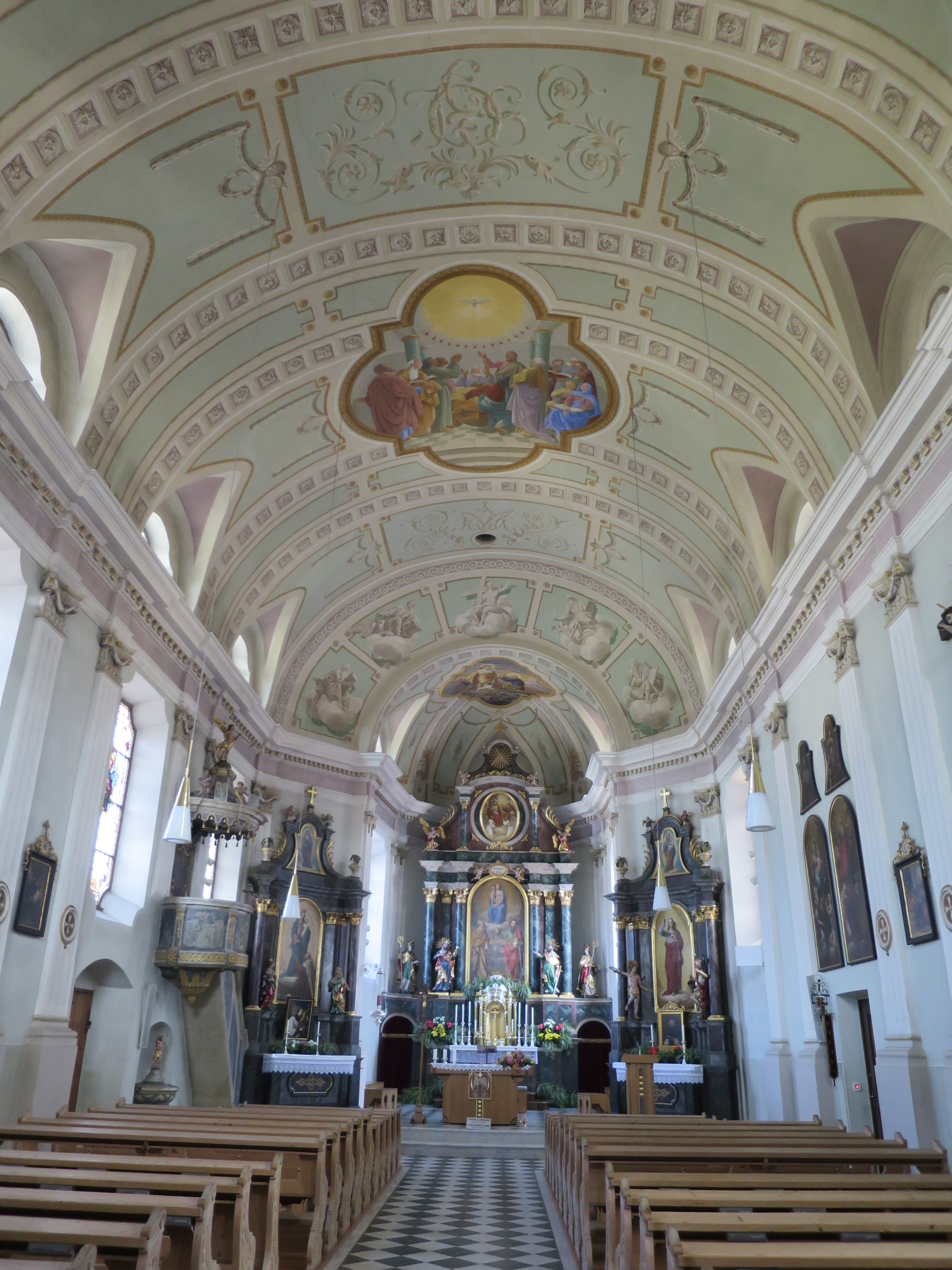 Kirche St. Peter und Paul in Reischach, in klassizistischer Form 1811-1814 erbaut.